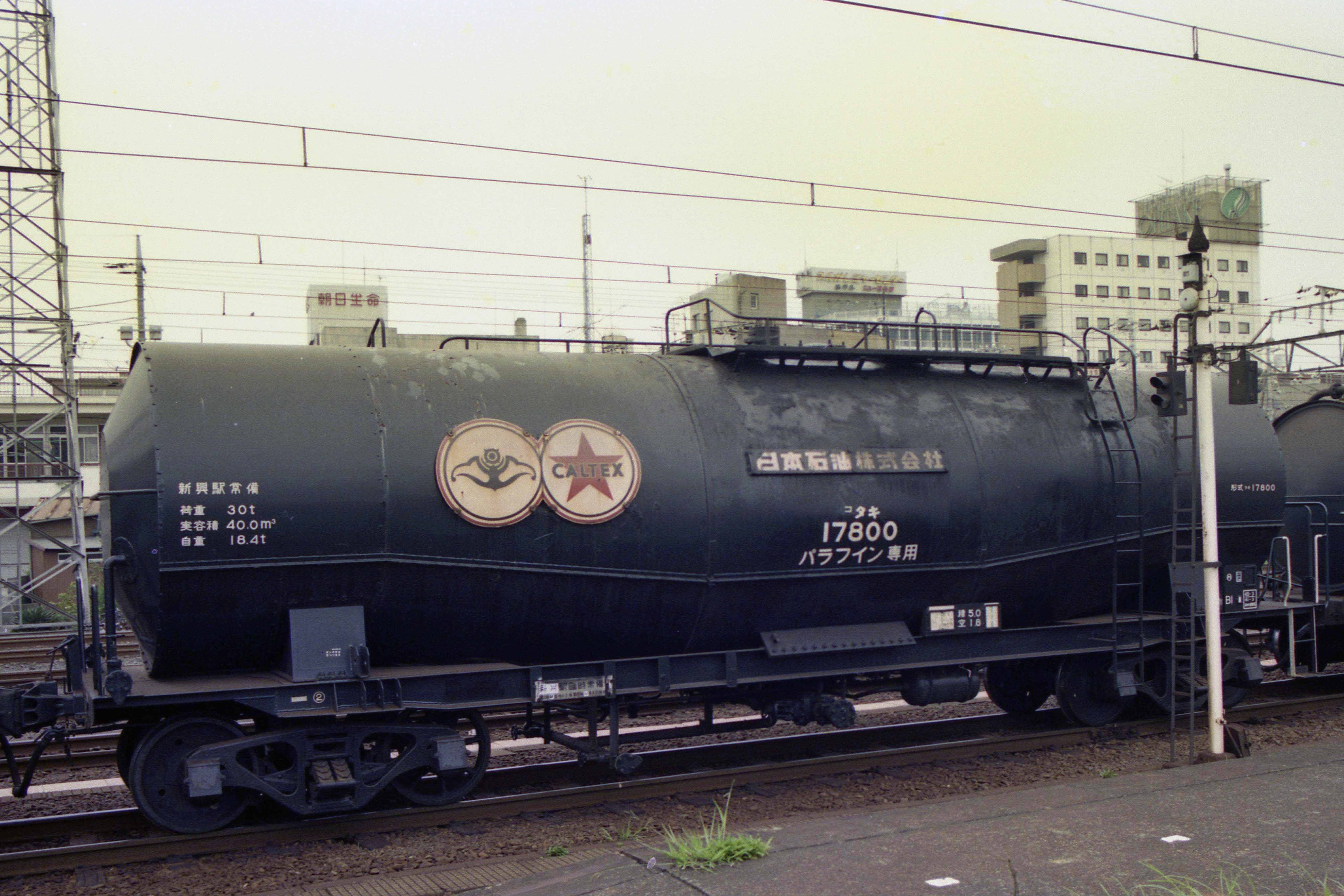 国鉄タキ17800形タキ17800。日本石油所有。1986年5月20日、沼津駅にて。